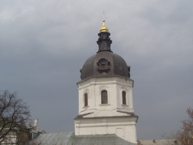 Blahovishchenska Сhurch at NaUKMA